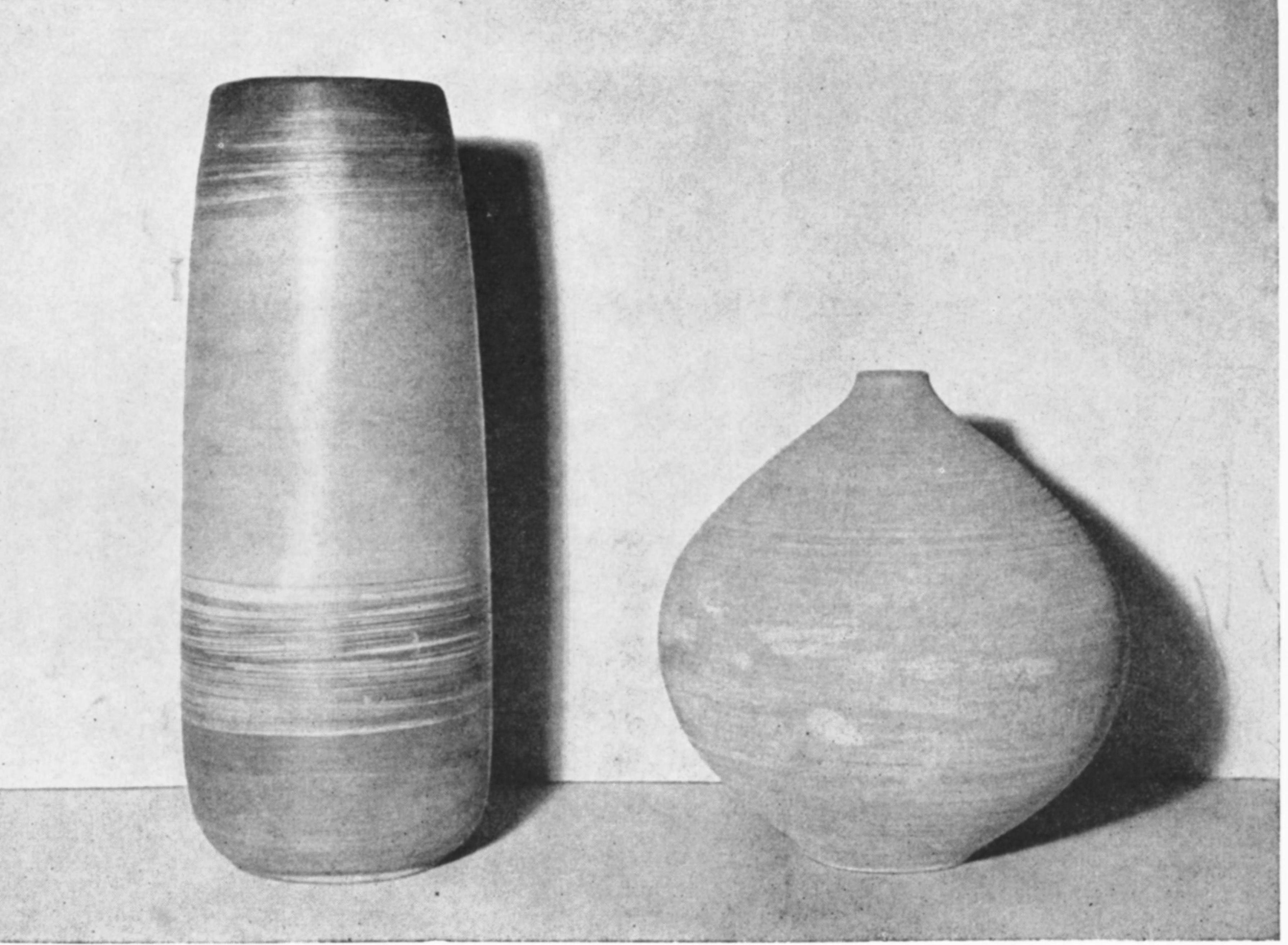 קרמיקה אמנותית. כדים. המורים: ד. וכטל וד. קלדרון. בצלאל, בית-ספר לאמנות ולאומנות, ירושלים. שנת הלימודים 1959/60 גזית, 207-208, כרך 18, זיון-תמוז תש"ך [1960], לוח 20